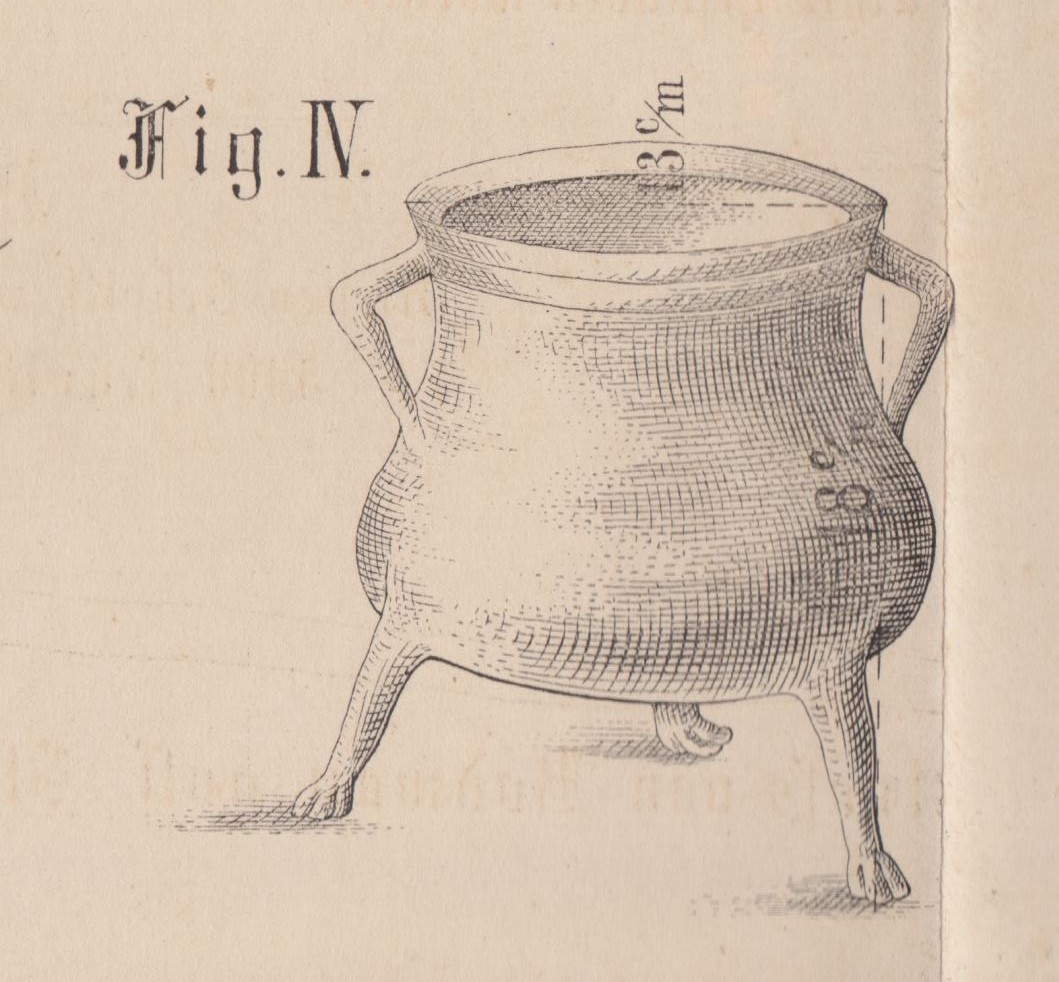 Deutschland (D) - Baden-Württemberg (BW) - Landkreis Konstanz (KN) - Bodman-Ludwigshafen: Villa rustica, "Abblidung eines gefundenen Gefäßes"